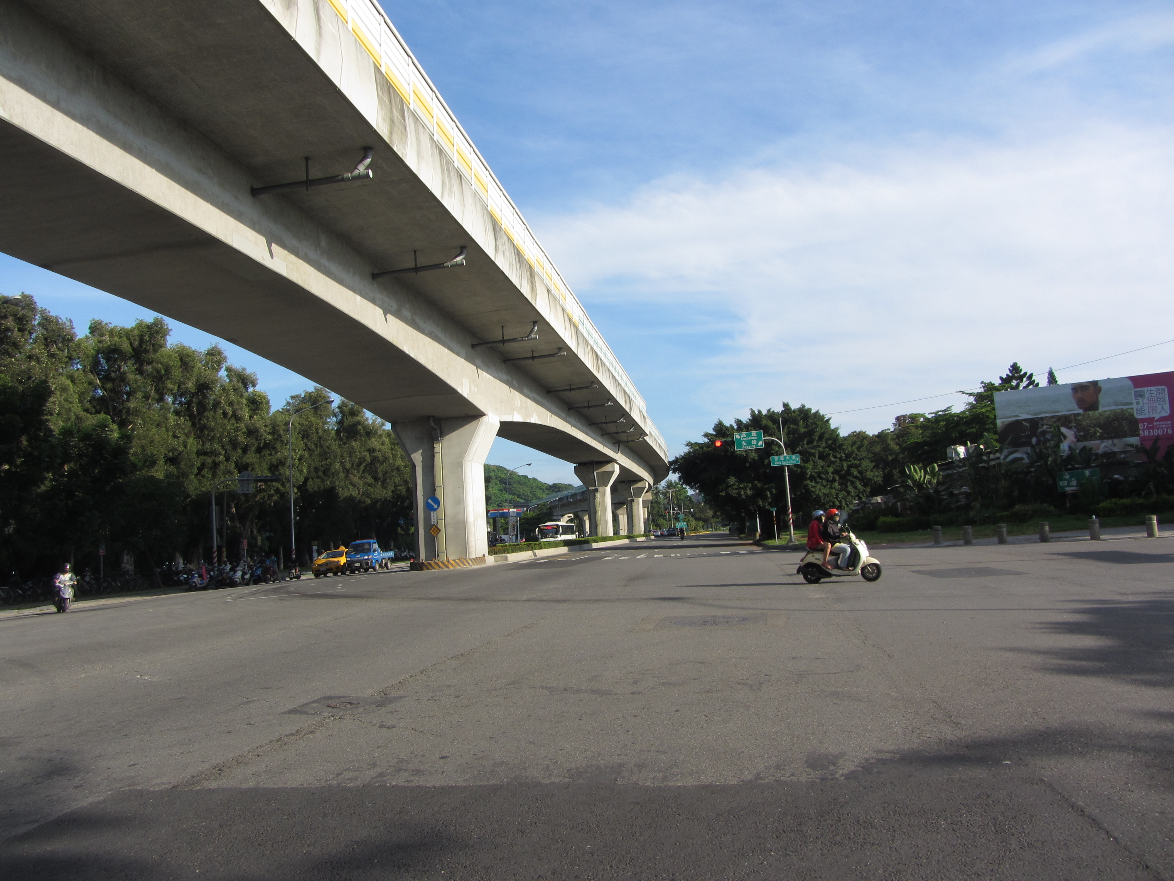 左楠路與世運大道交叉處